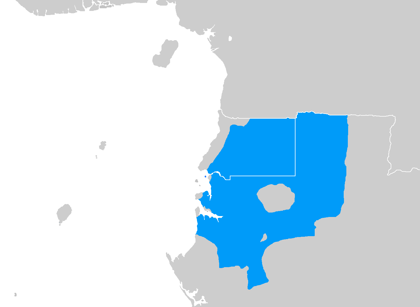 idioma fang